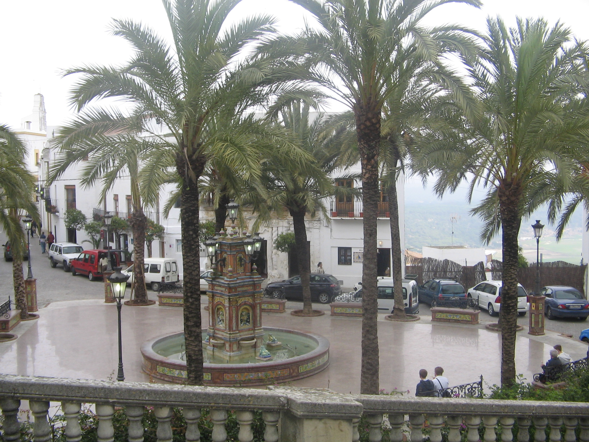 Plaza de Vejer de la Frontera, provincia de Cádiz (España).